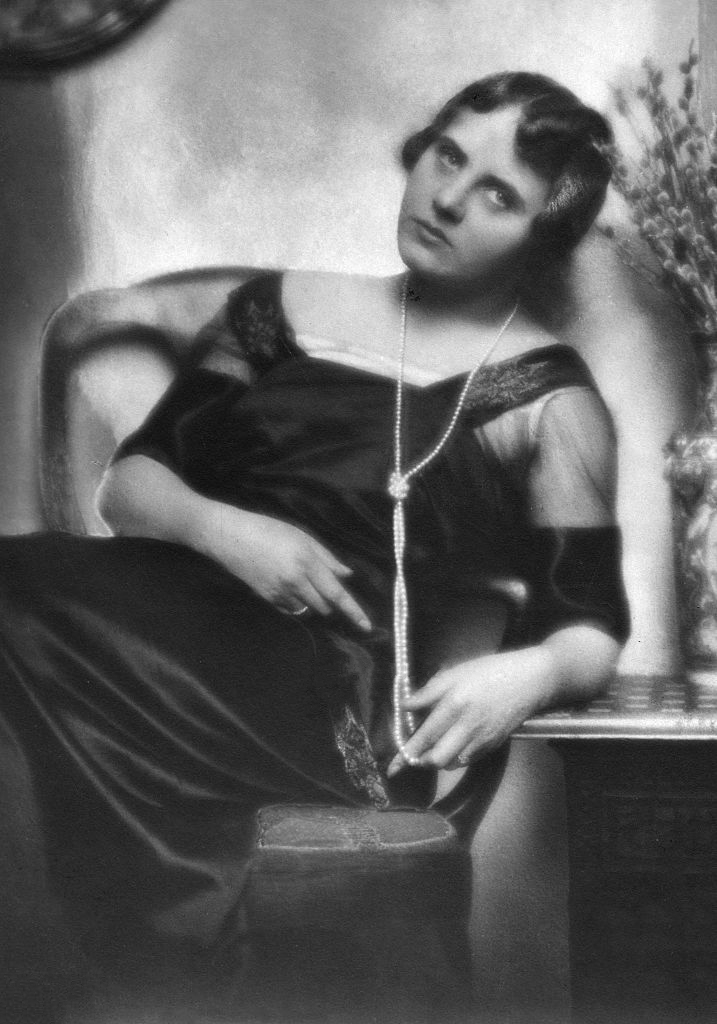 Portrait der Schauspielerin Ossi Oswalda (1897-1947) von Nicola Perscheid.